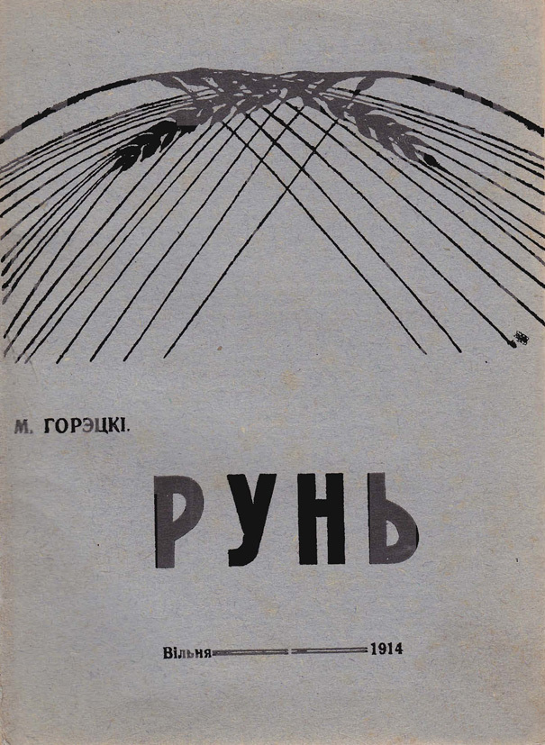 Беларуская (тарашкевіца): Вокладка зборніка апавяданьняў Максіма Гарэцкага «Рунь», 1914 г.